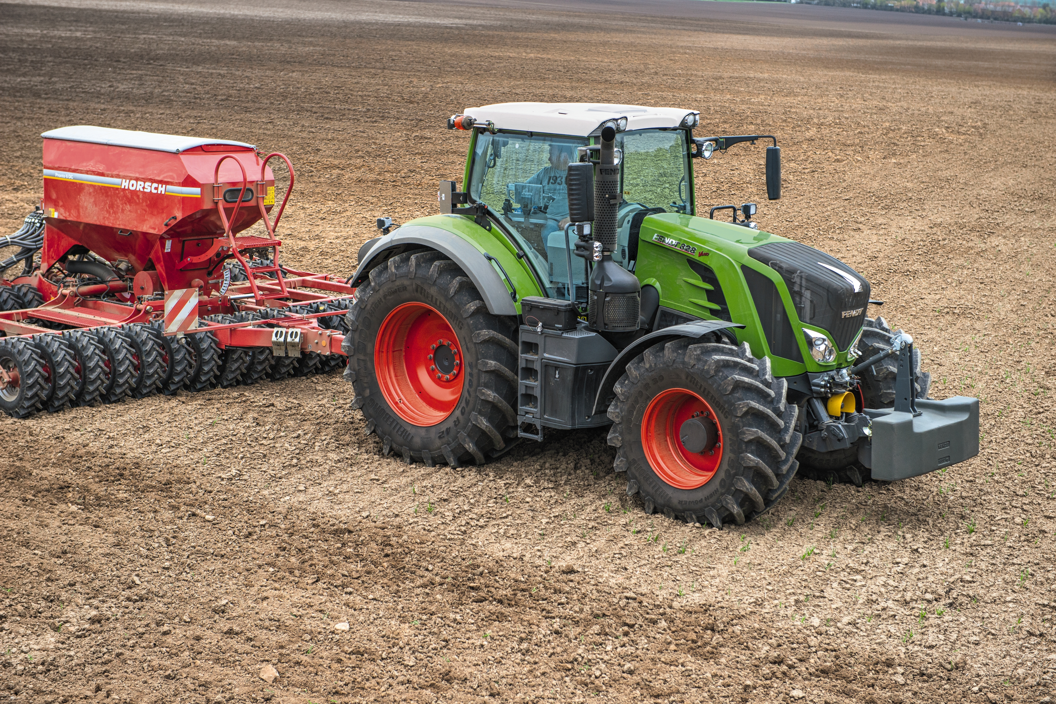 Fendt 828 Vario mit einer Drillmaschine von Horsch